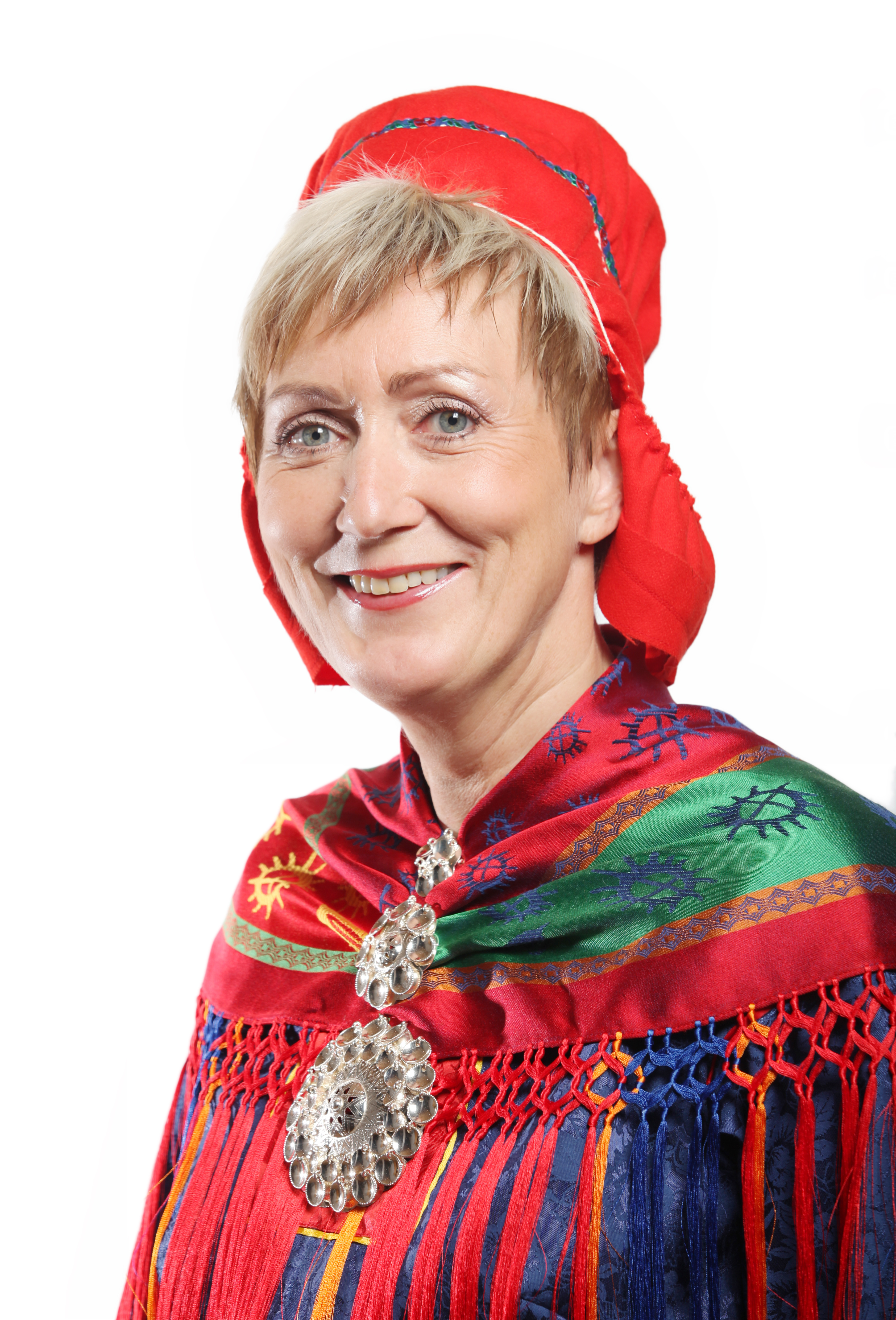 Medlem av plan- og finanskomitéen. Foto: Kenneth Hætta / Sametinget.